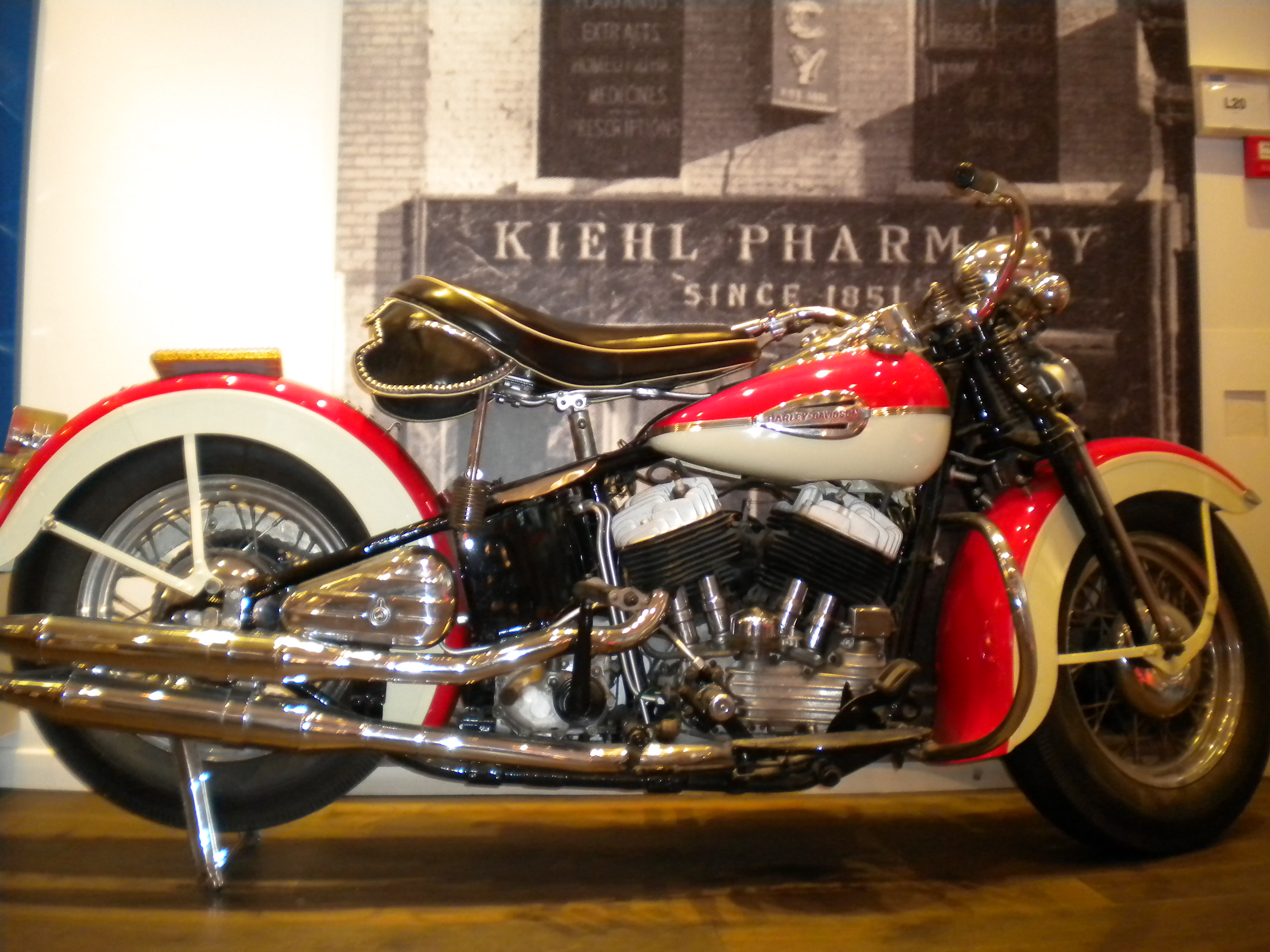 vintage harley davidson, taken in madrid in 2011 in a store used as a prop very cool